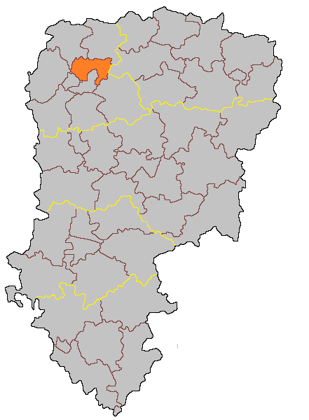 Кантон Сен-Кантен-Нор на карте департамента Эна